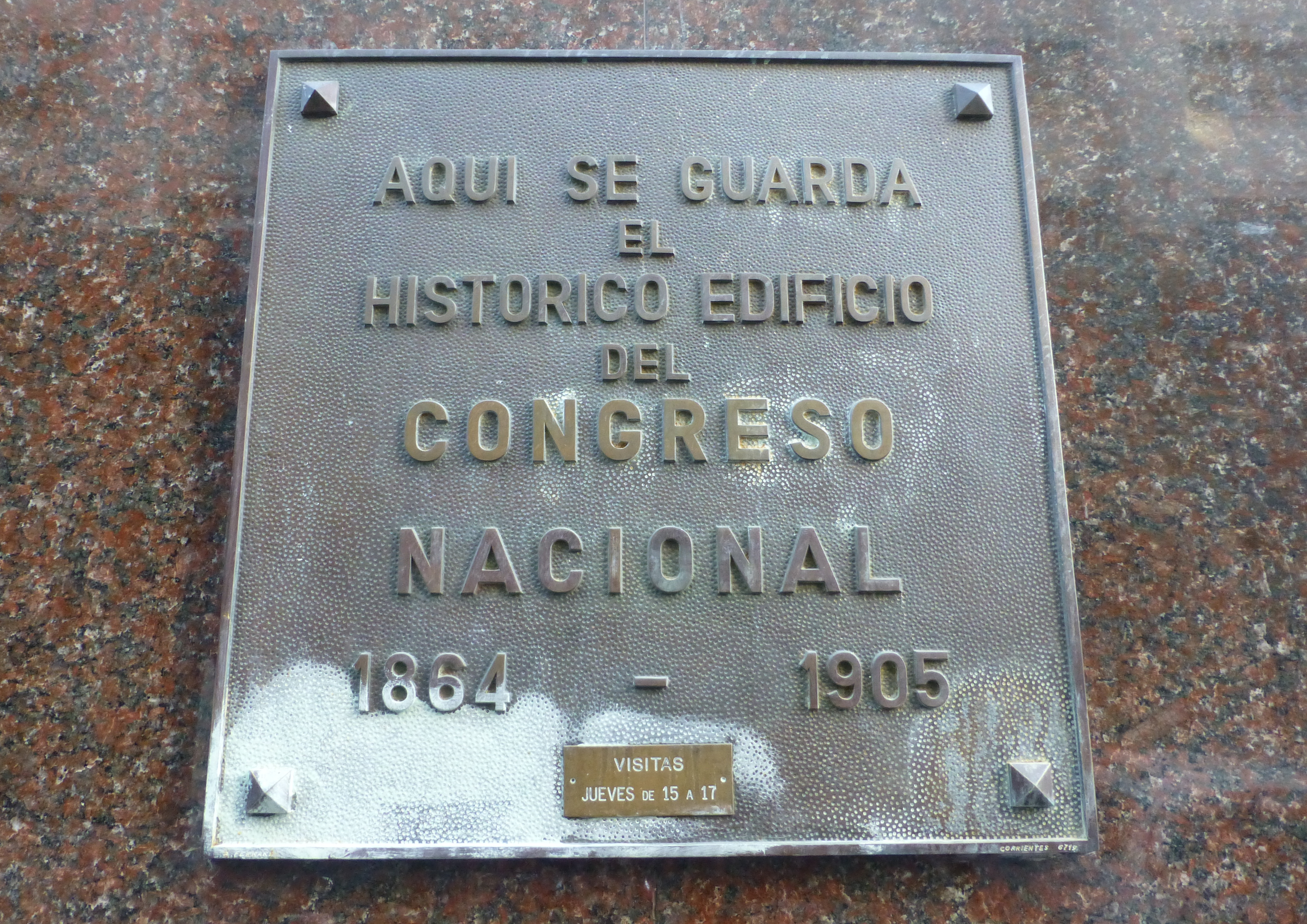 Placa que indica el recinto del antiguo Congreso Nacional, sobre la calle Balcarce al 100, Buenos Aires.